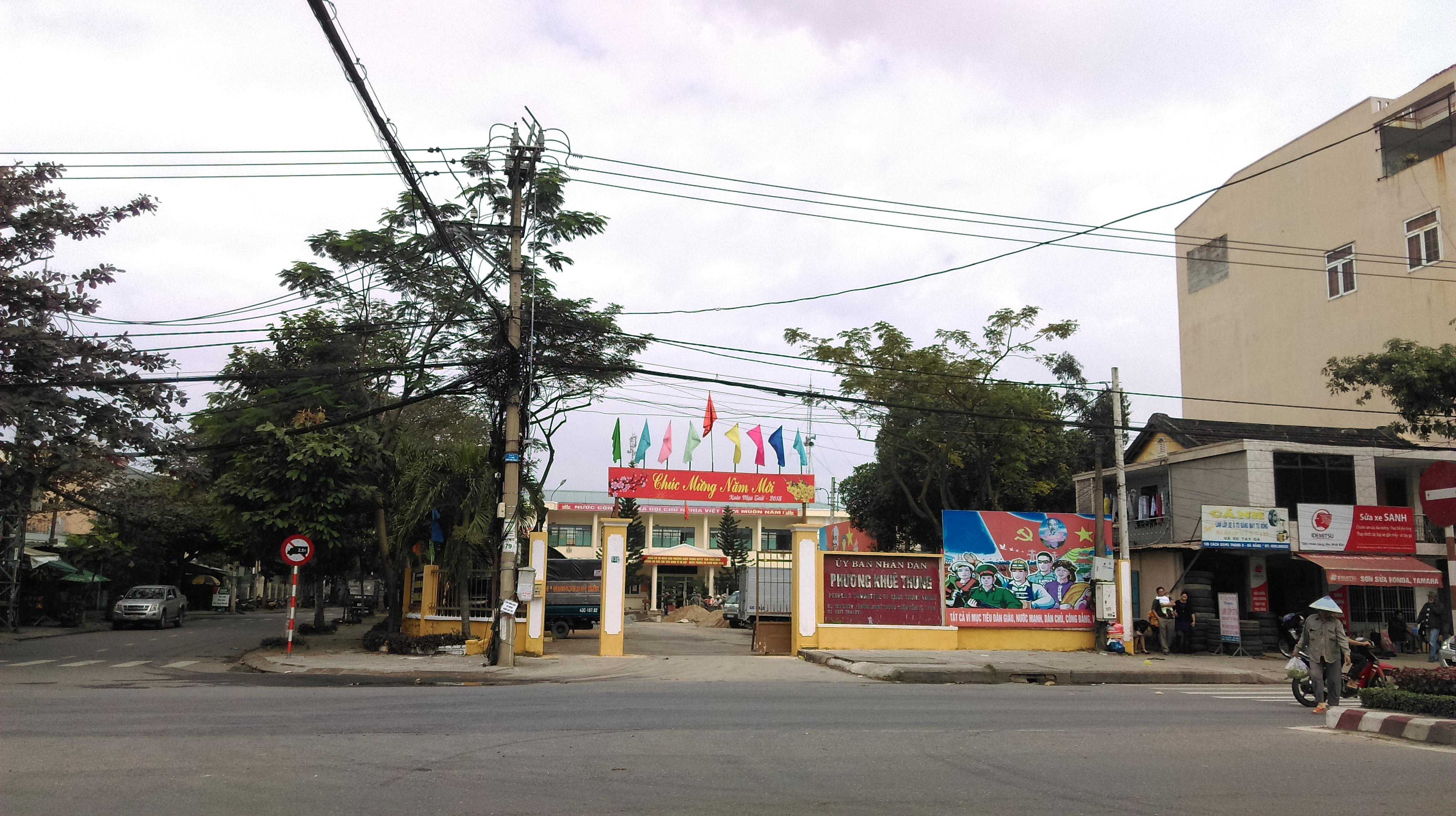 UBND phường Khuê Trung, Cẩm Lệ, Đà Nẵng